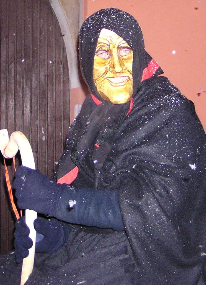 A picture done during Giubiana festival in Canzo.